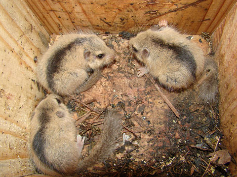 巣箱を利用したヤマネ